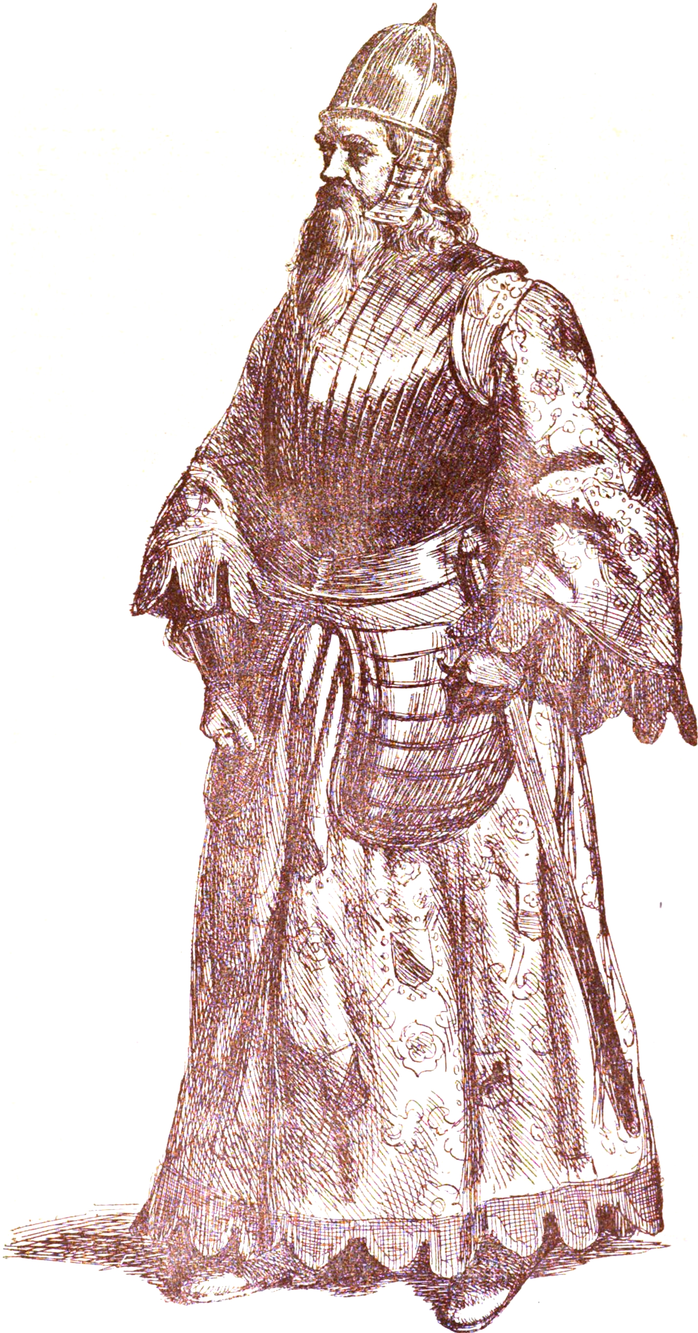 Den svenske skådespelaren Georg Dahlqvist som Birger Jarl i Bröllopet på Ulfåsa. Teckning av Josef Wilhelm Wallander.